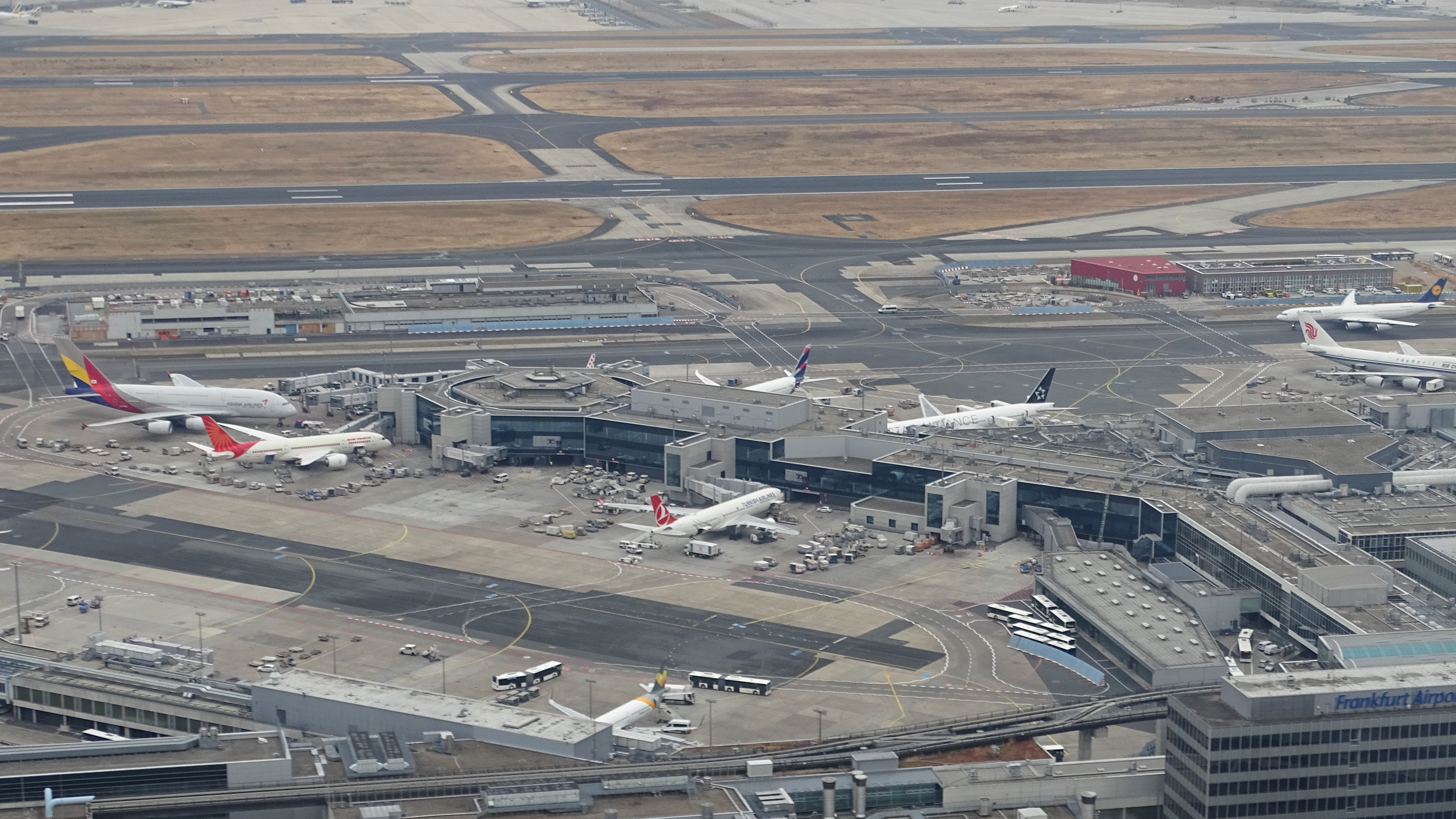 Flughafen Frankfurt am Main